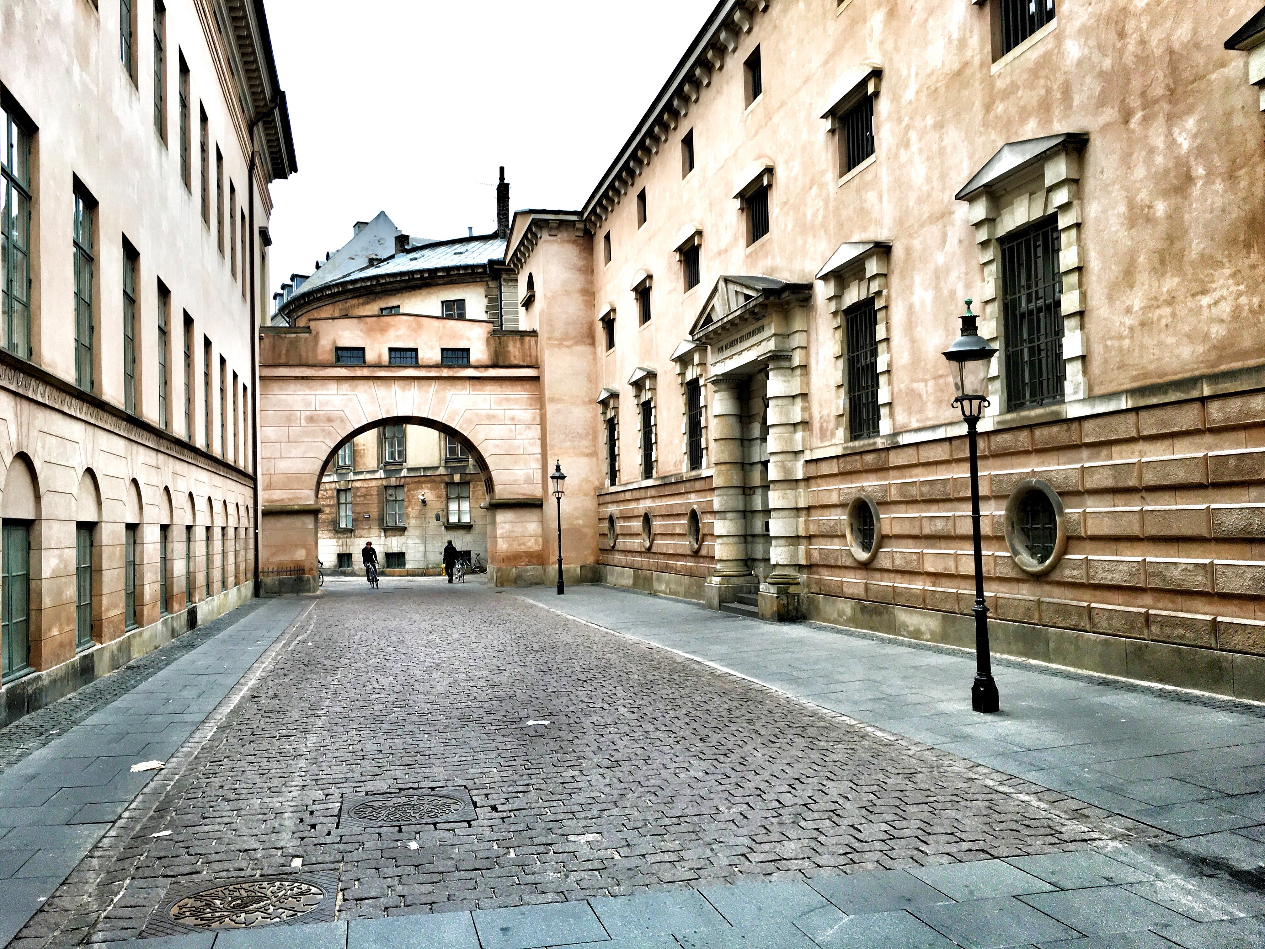 Slutterigade, København